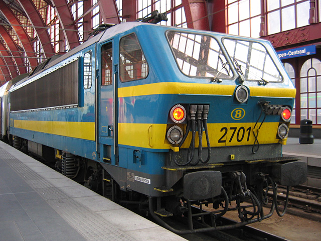 Locomotief 2701 in het station Antwerpen-Centraal